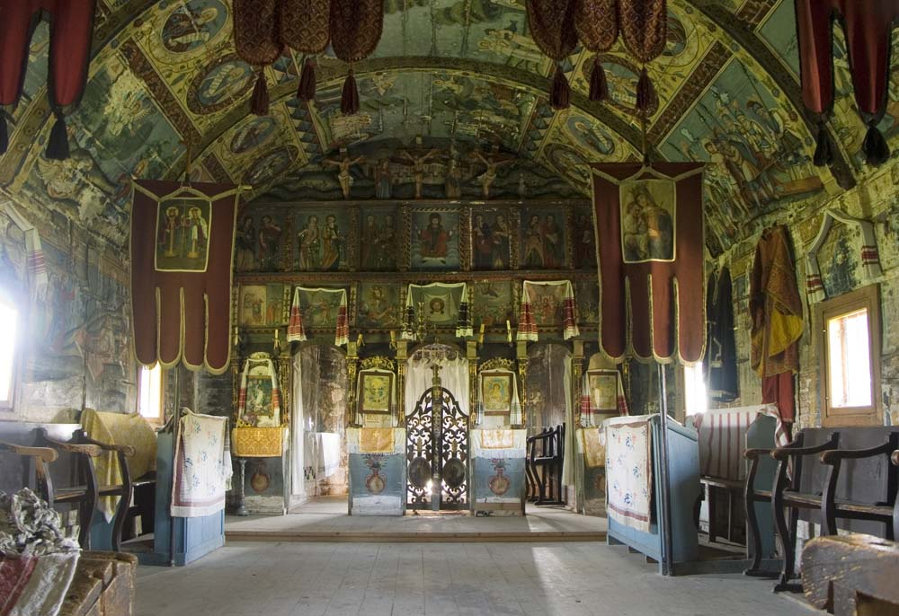 Biserica de lemn din Fildu de Sus: interiorul navei spre iconostas.